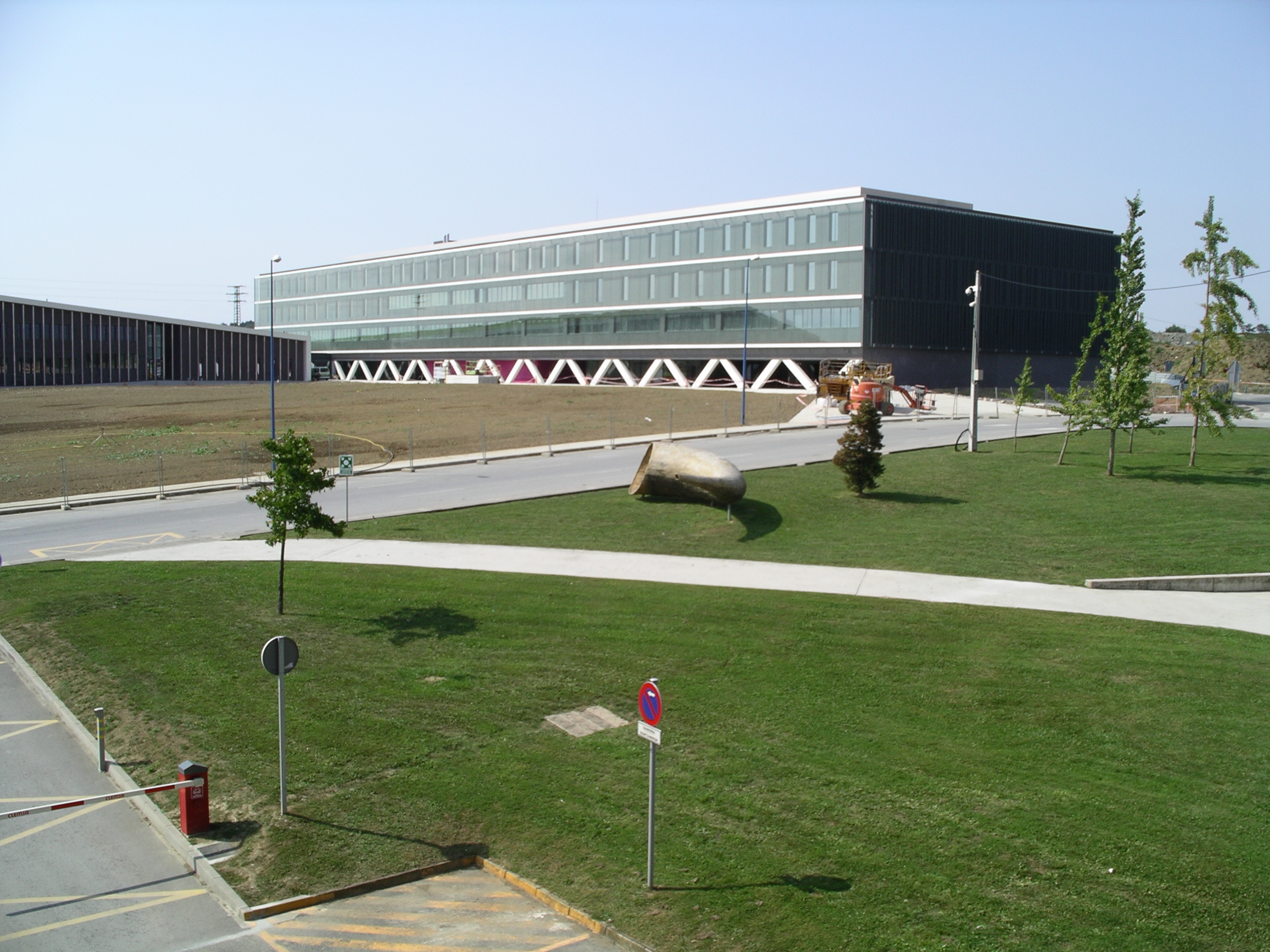 Bizkaiko Campuseko Irakasleen eskola, Leioa-Erandio, Euskal Herriko Unibertsitatea.